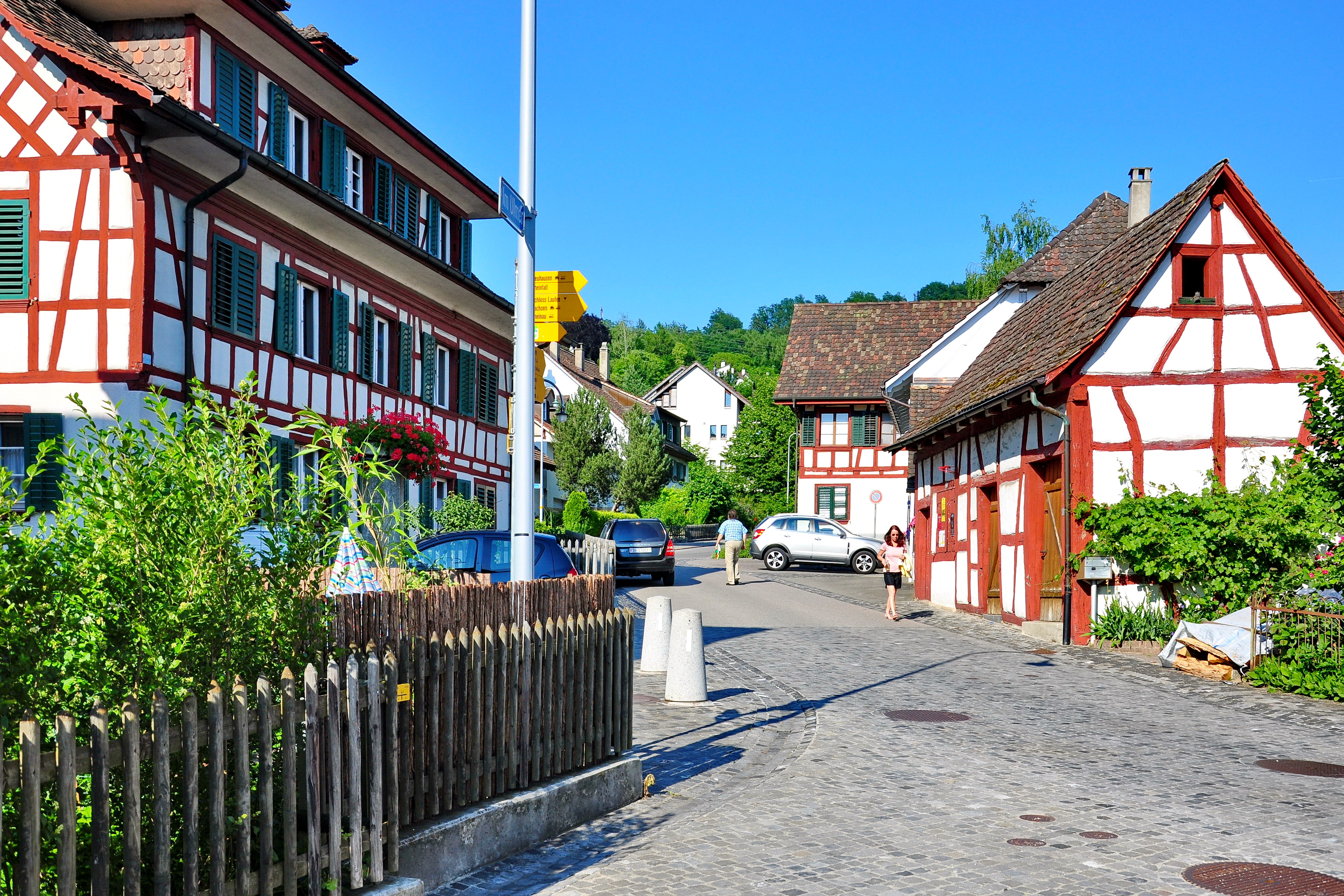 Flurlingen (Switzerland)